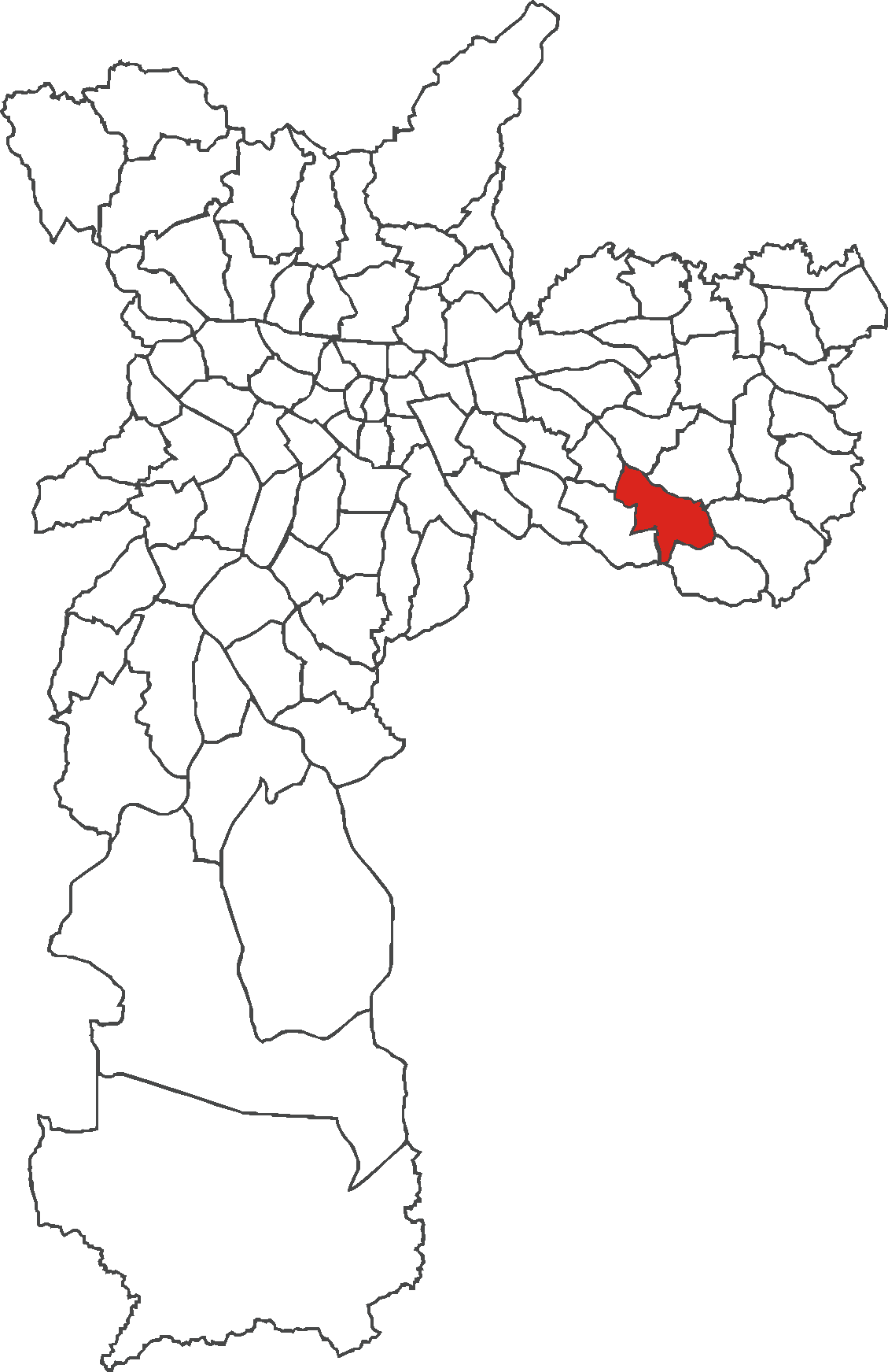 Localização do distrito de São Mateus no município de São Paulo.